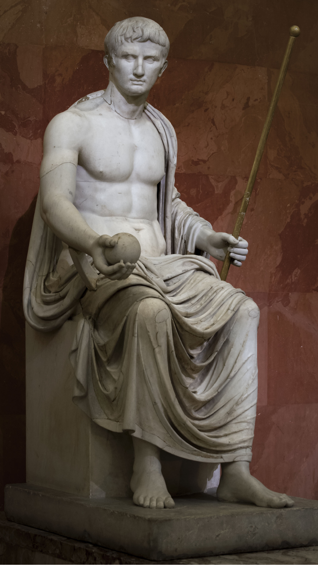 Октавиан Август в образе Юпитера. Мрамор. 1-я пол. I в. Инв. № ГР-4191 (А 399). Санкт-Петербург, Государственный Эрмитаж.